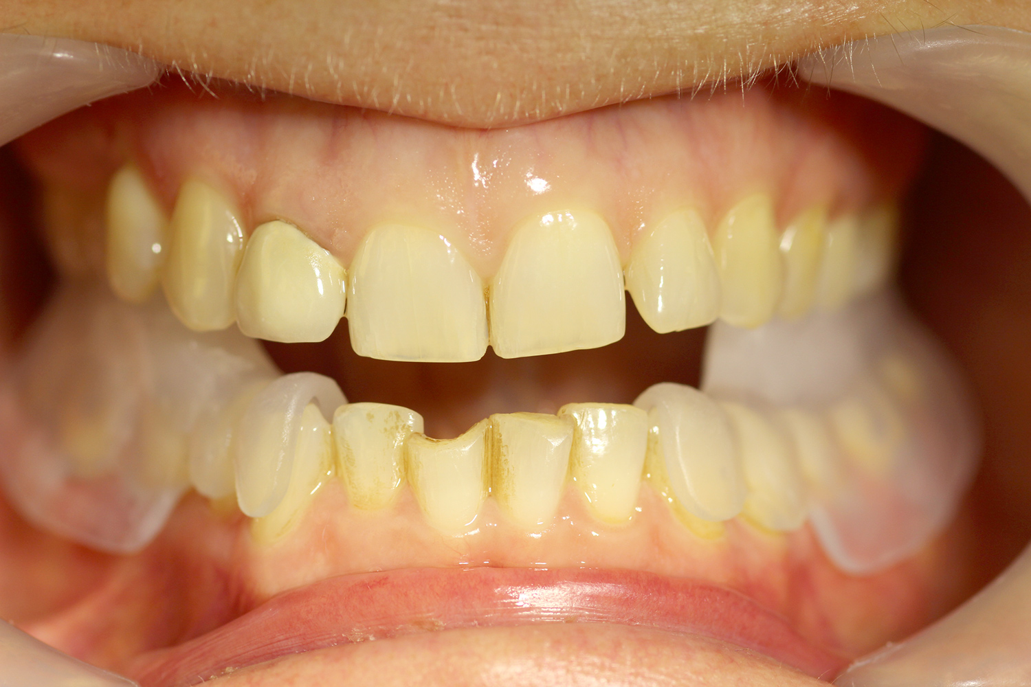 Balance-Schiene nach Reinhardt am Paienten